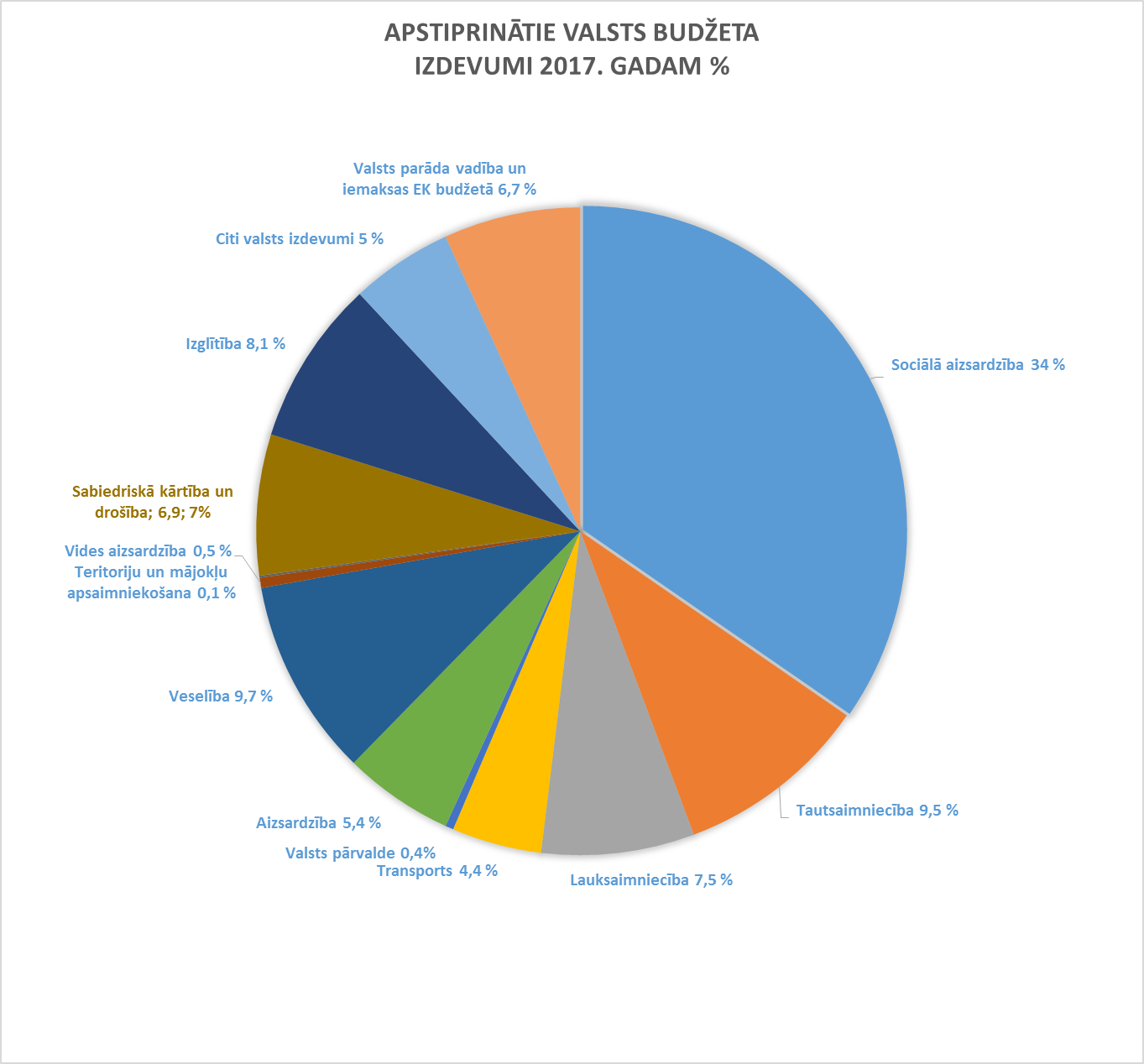 Apstiprinātie valsts budžeta izdevumi 2017 procentuāli